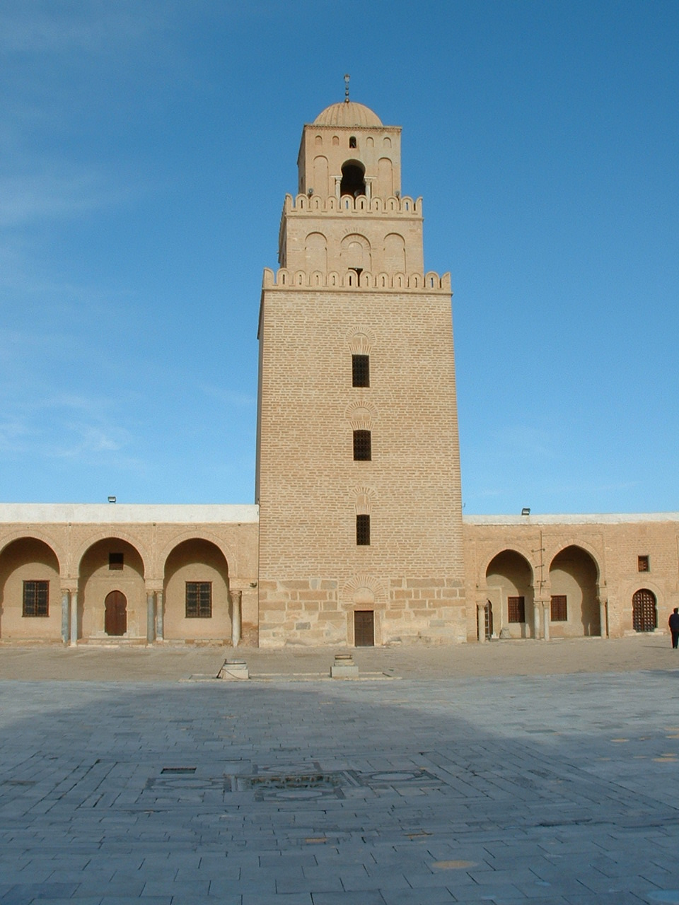 Photographie personnelle (Asram) de la mosquée de Kairouan (Tunisie). Elle représente le minaret. Au premier plan, on aperçoît le collecteur d'eau de pluie.